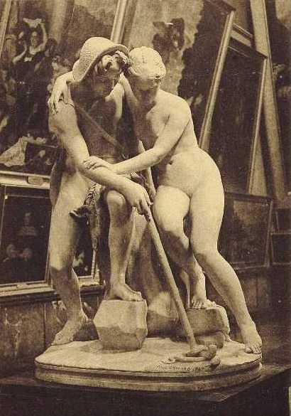 sculpture de Raymond Gayrard au musée des beaux-arts de Caen.